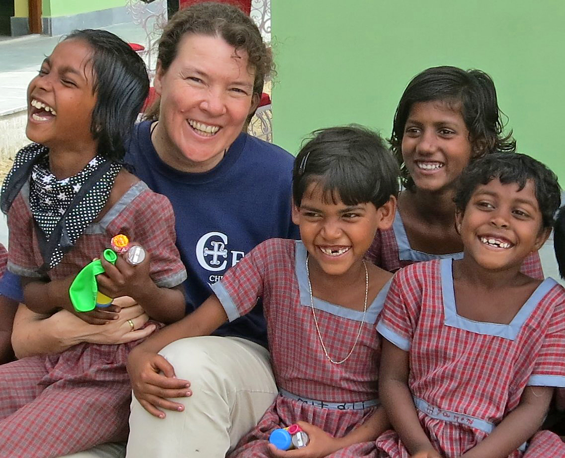 Susanne Pechel in Indien 2014